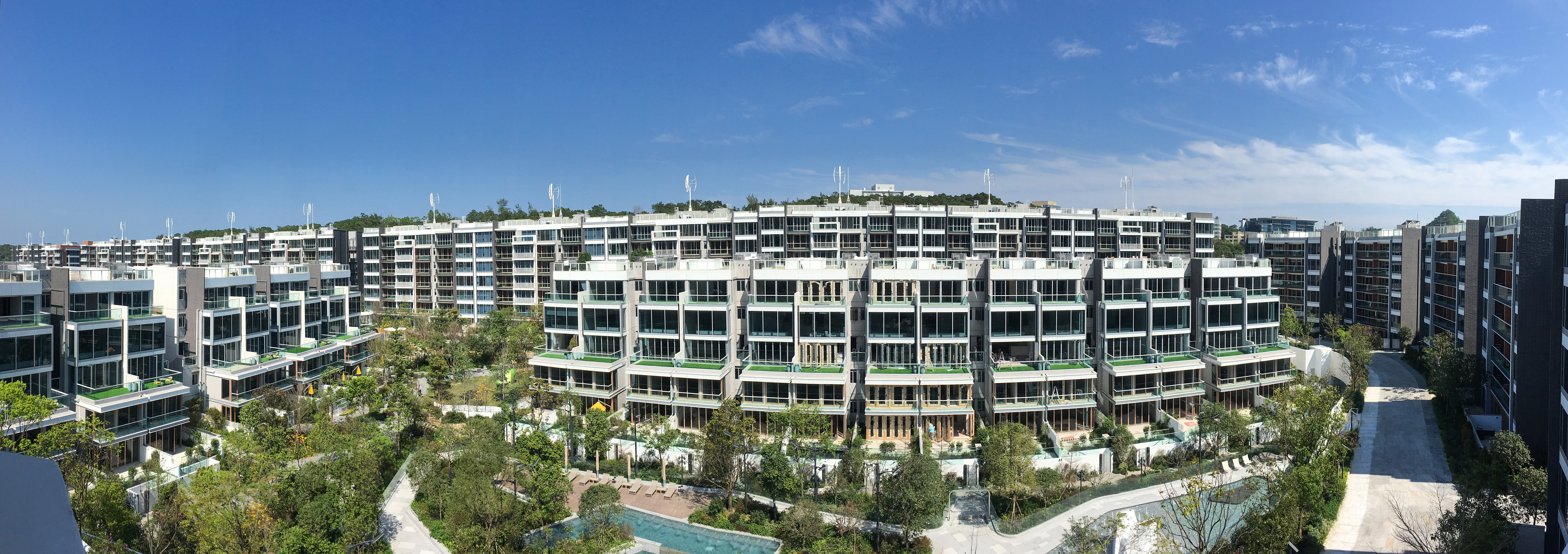 Mount Pavilia Pano